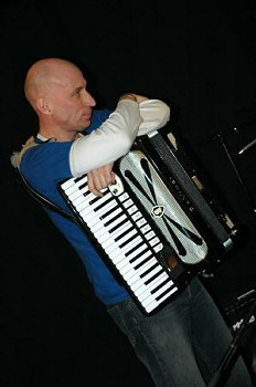 Bildo de Kim J. Henriksen